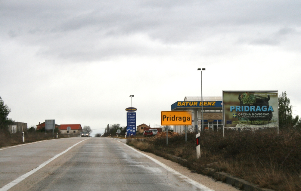 Zagreb_Split